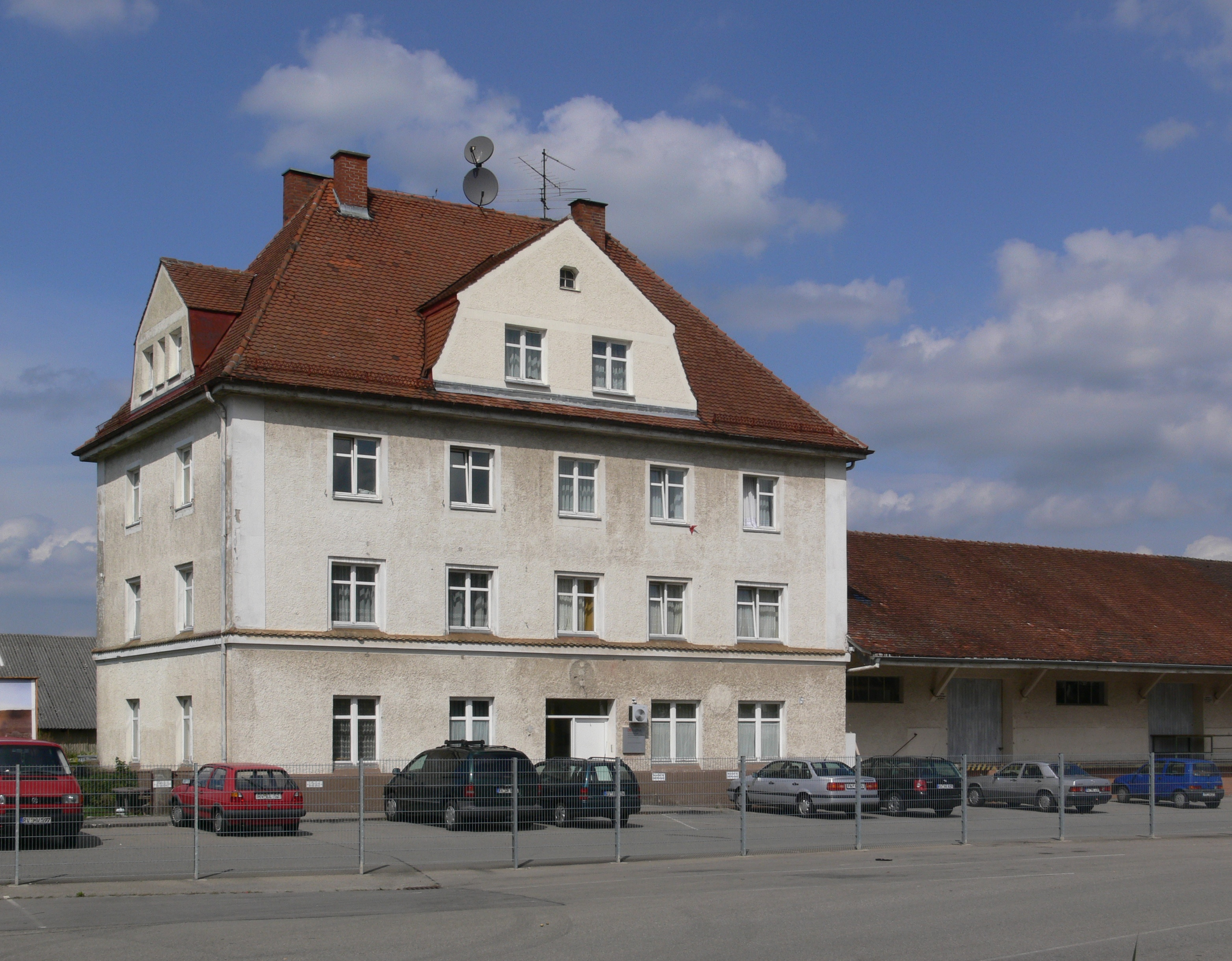 Güterbahnhof Weingarten (Württemberg)